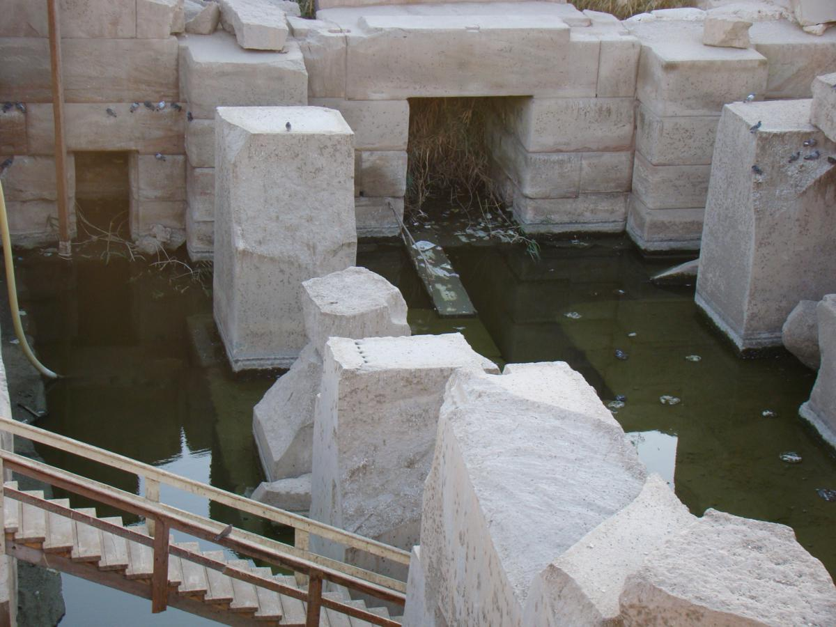 Абидос, древние развалины (по некоторым версиям здесь находится могила Озириса)